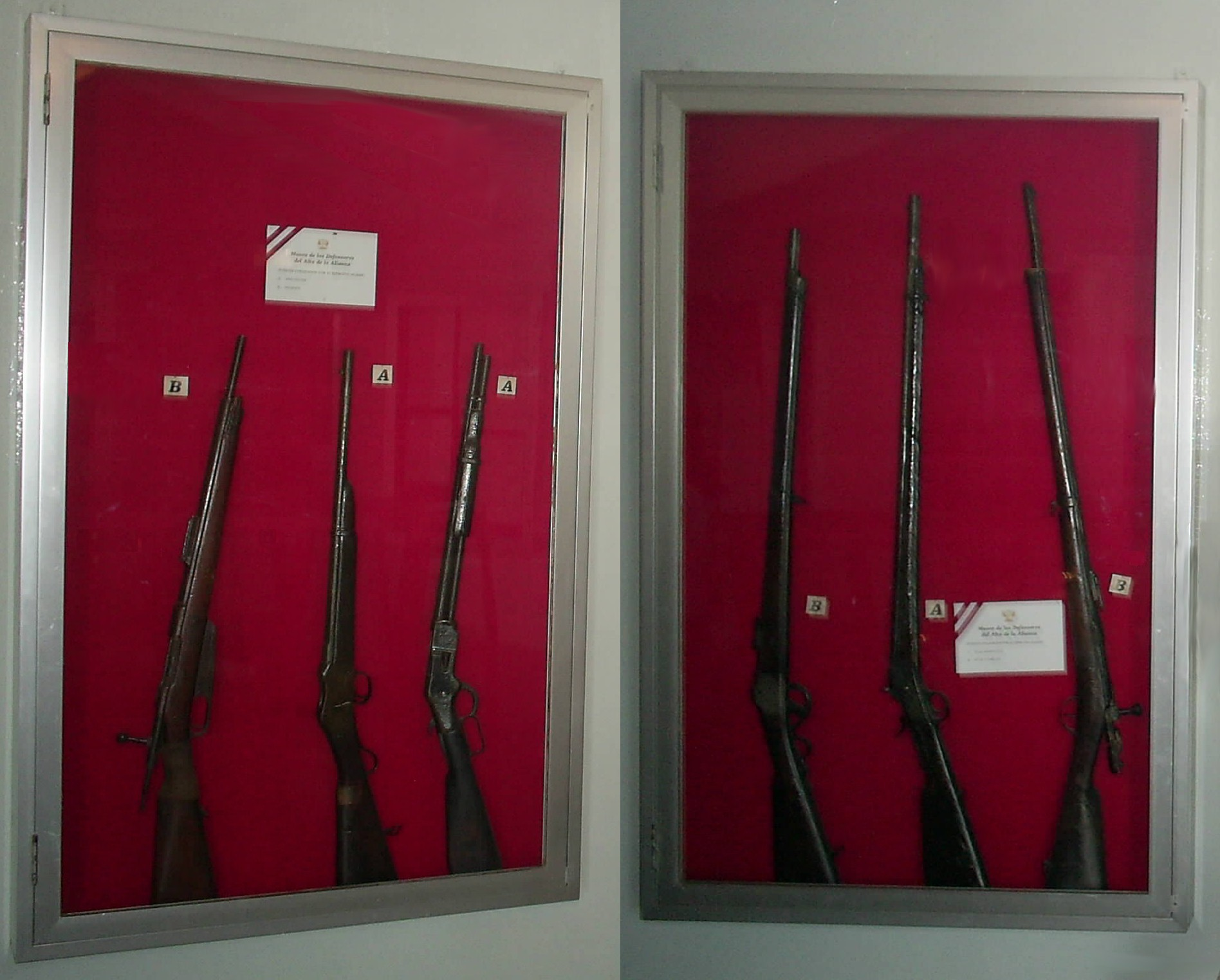 Campo de la Alianza. Museo. Armamento Aliado